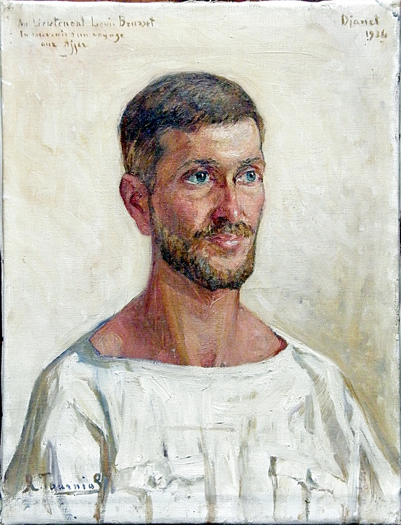 Portrait du lieutenant Louis Brusset peint par Renée Tourniol pour le remercier de l'avoir guidée lors d'un séjour dans les Ajjers